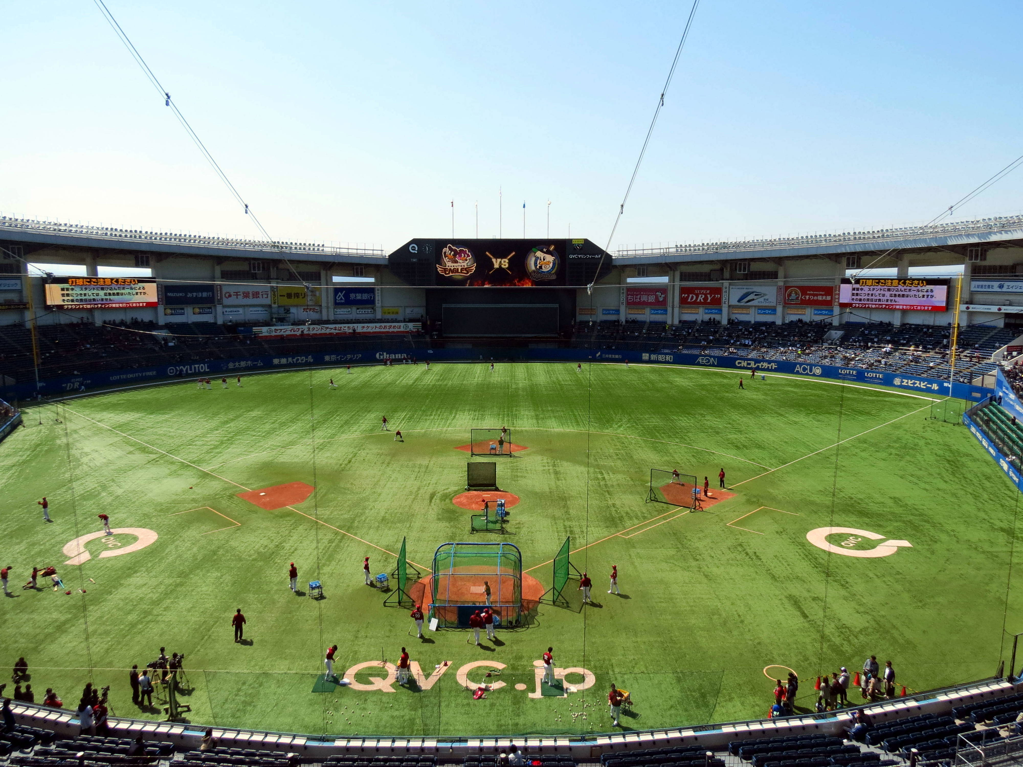 Tohoku Rakuten Golden Eagles at Chiba Lotte Marines